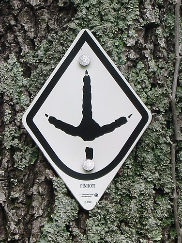 Pinhoti Trail Blaze / Marker